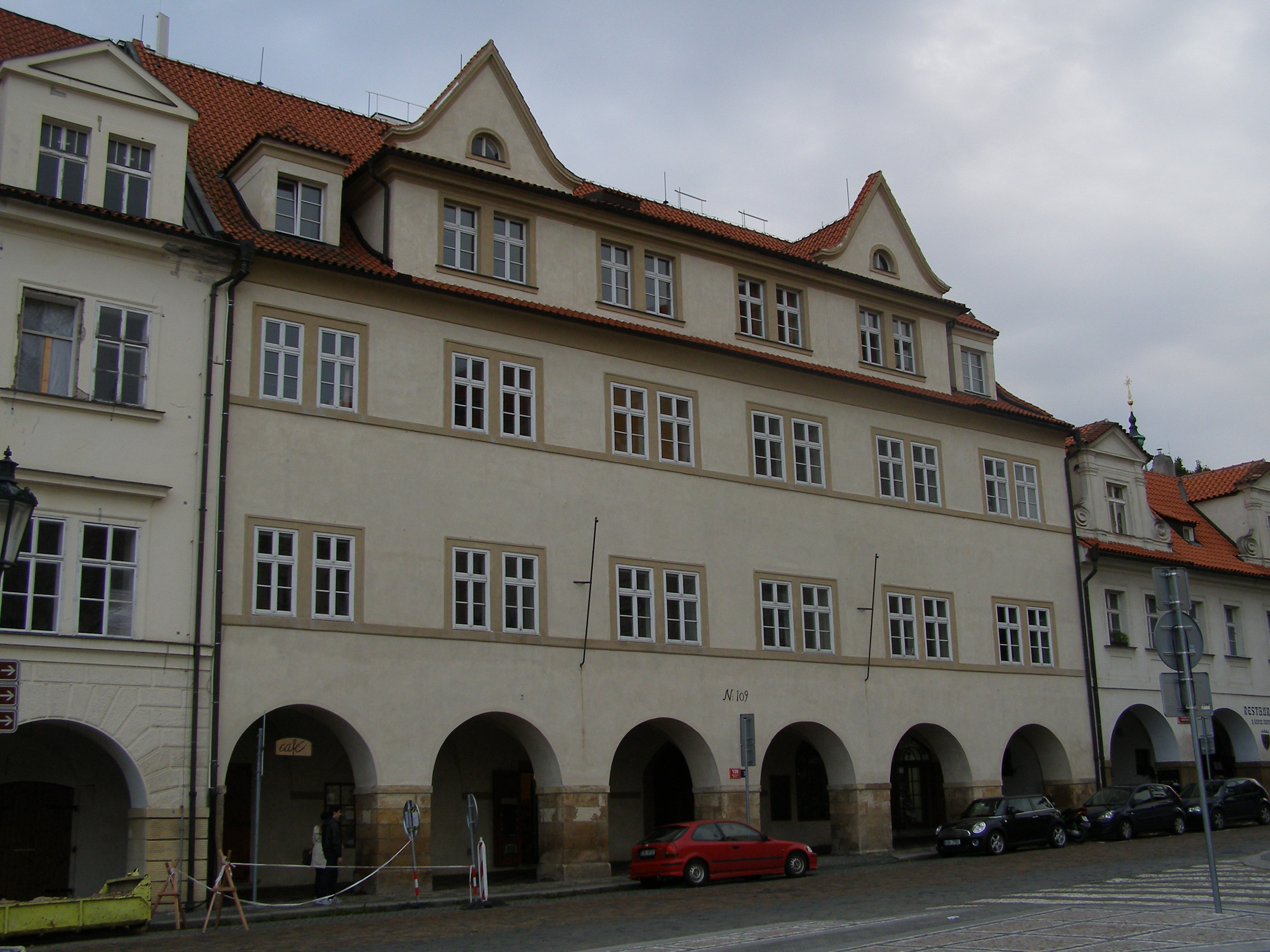 Měšťanský dům U Pešků, U Deklamátorů, Praha 1, Loretánské náměstí, Úvoz 109/3